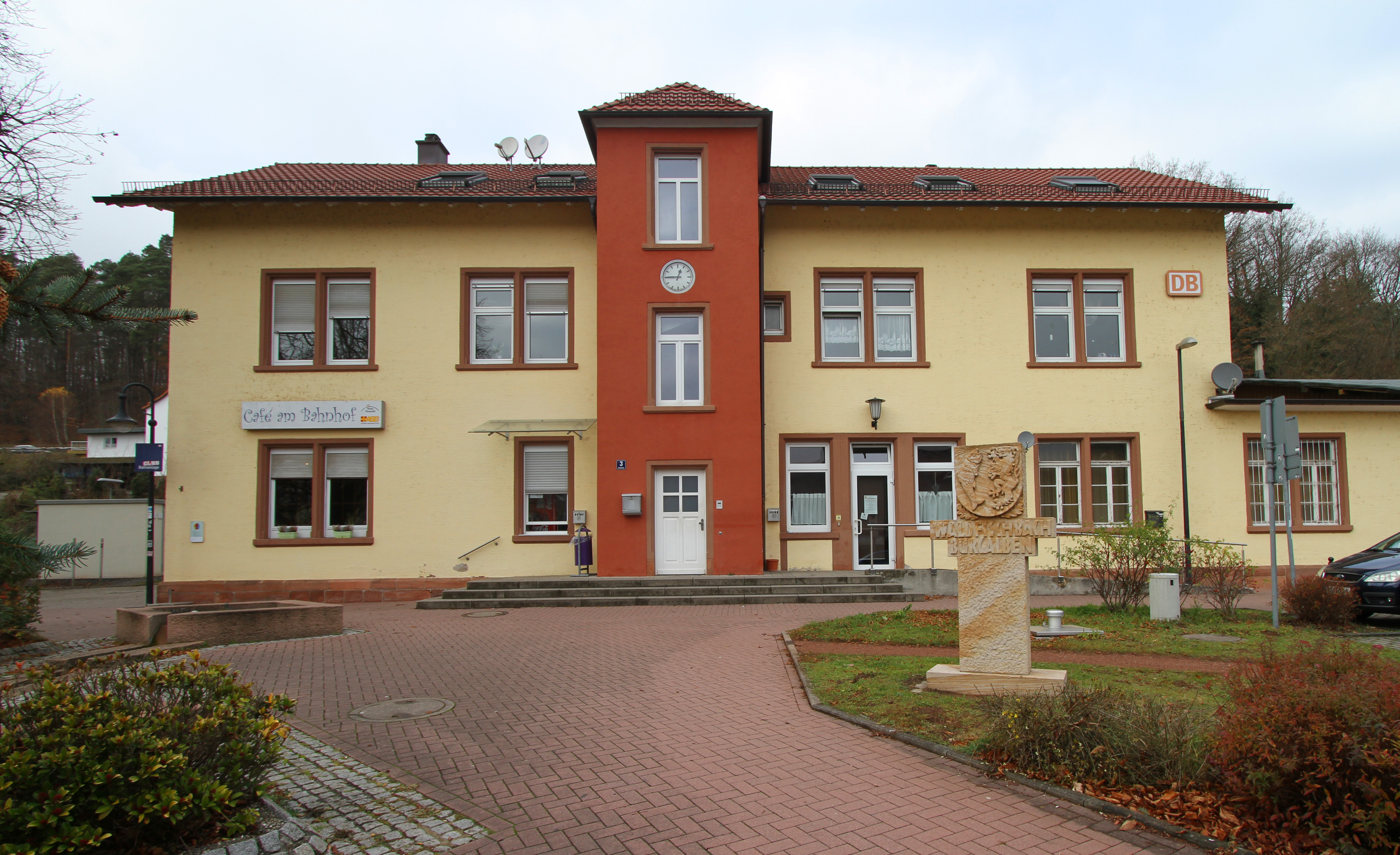 Waldfischbach